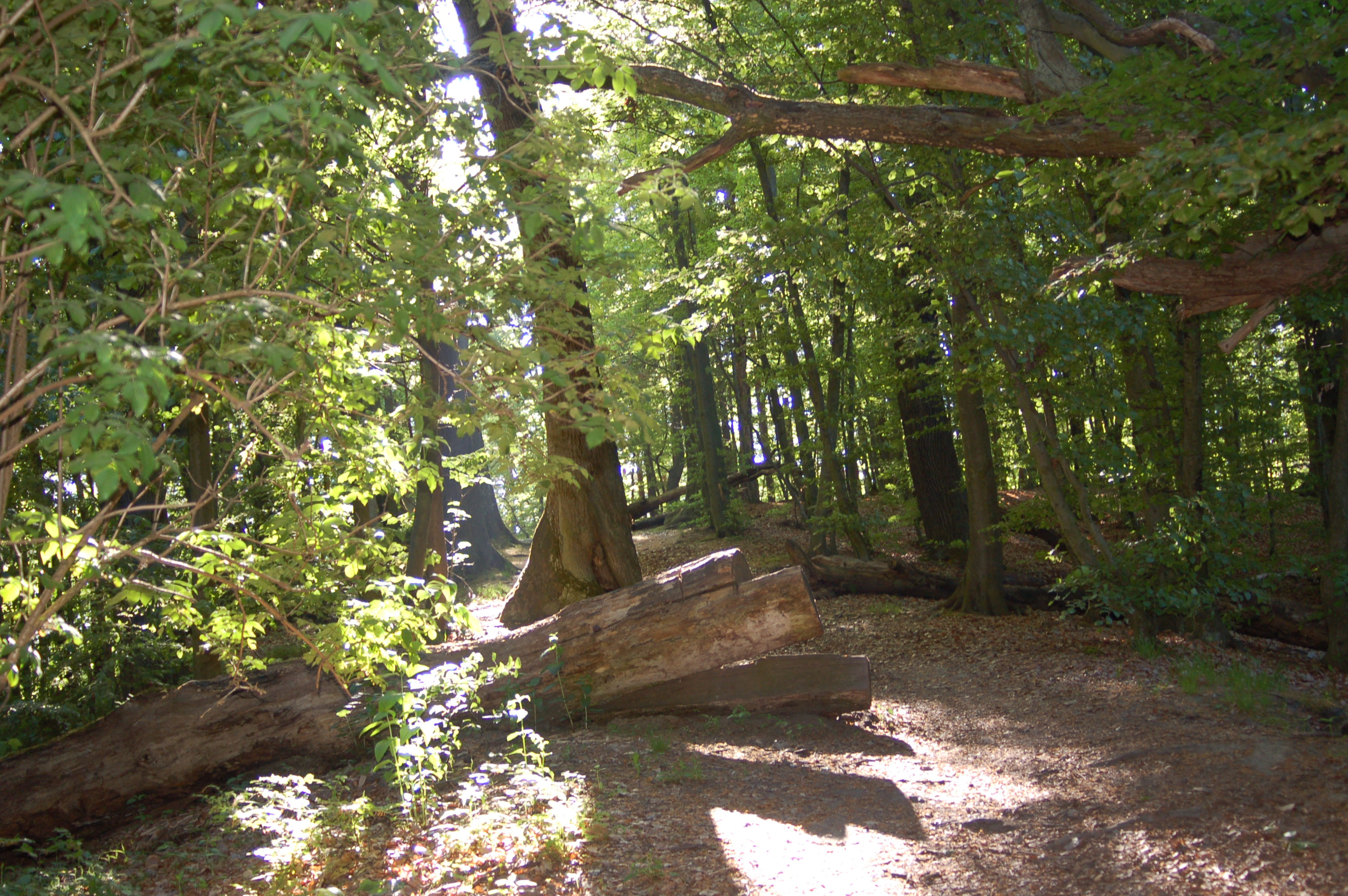 Sopot - TPK